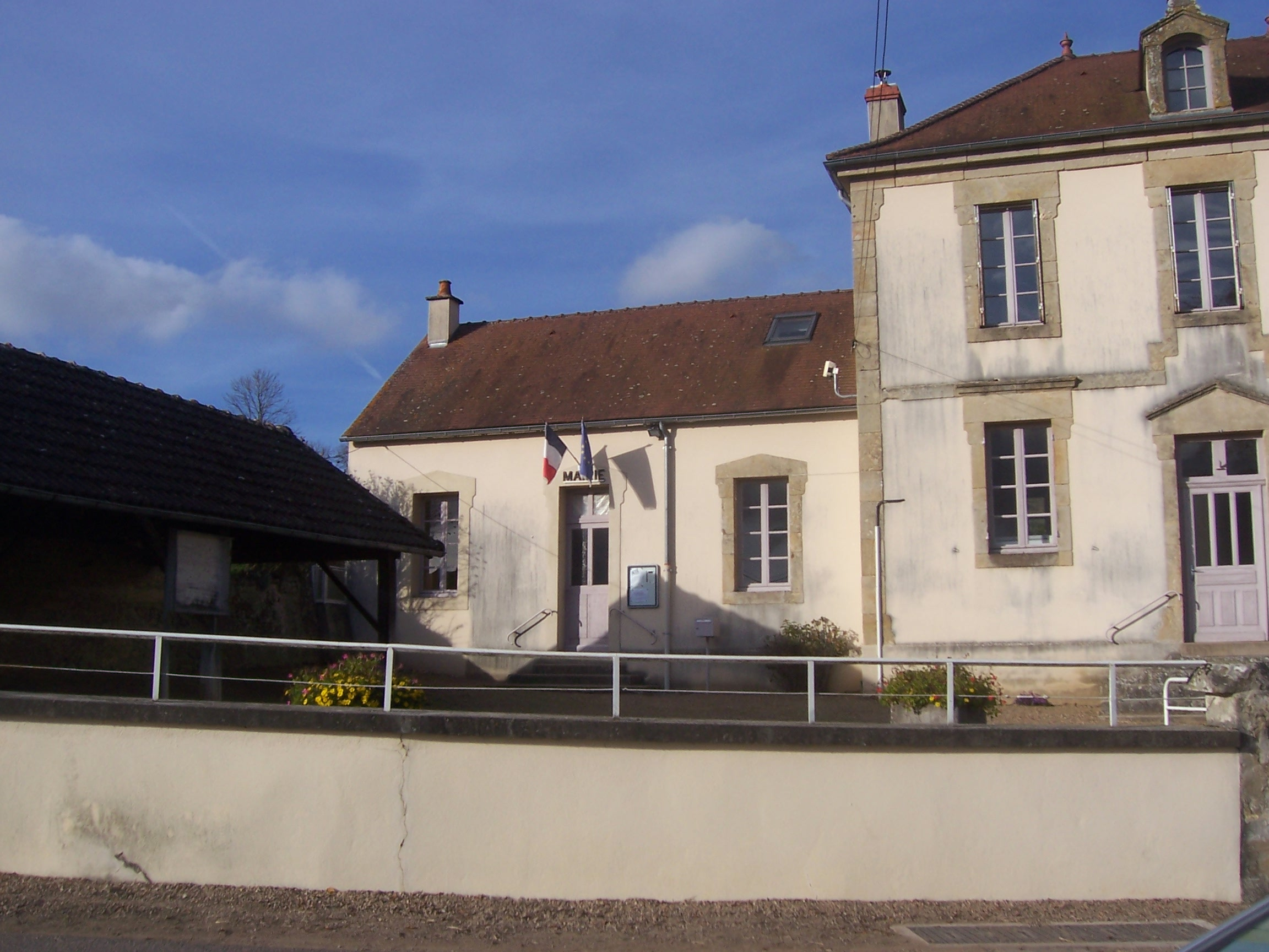 Mairie de Barnay